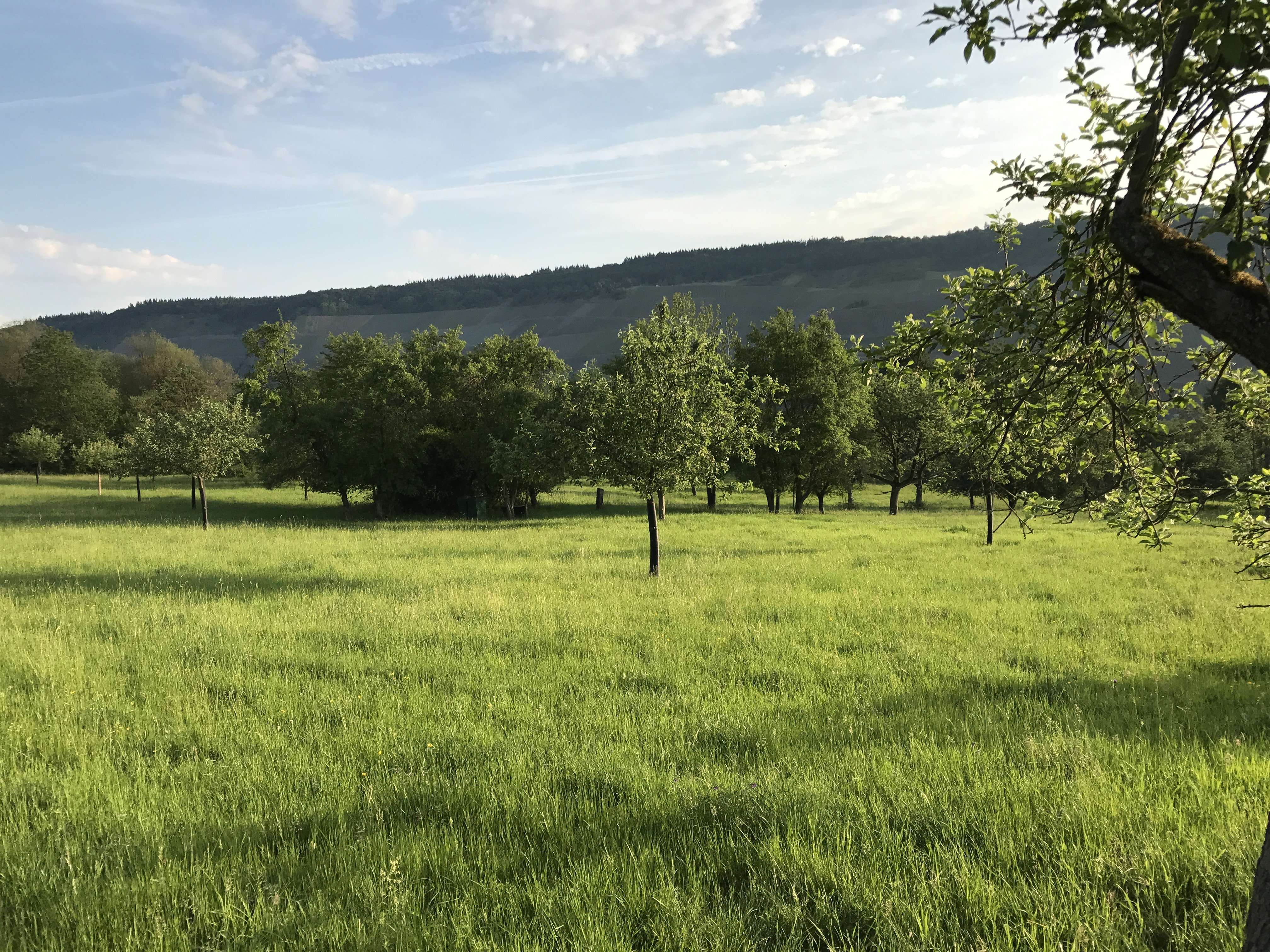 (NSG:RP-7231-052)_Streuobstwiesen bei Wehlen